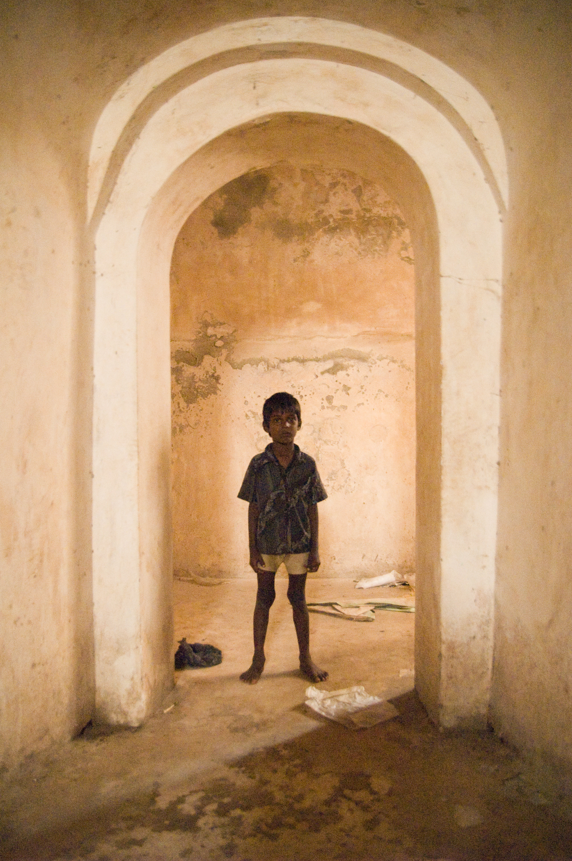 dungeons of Seringapatam.